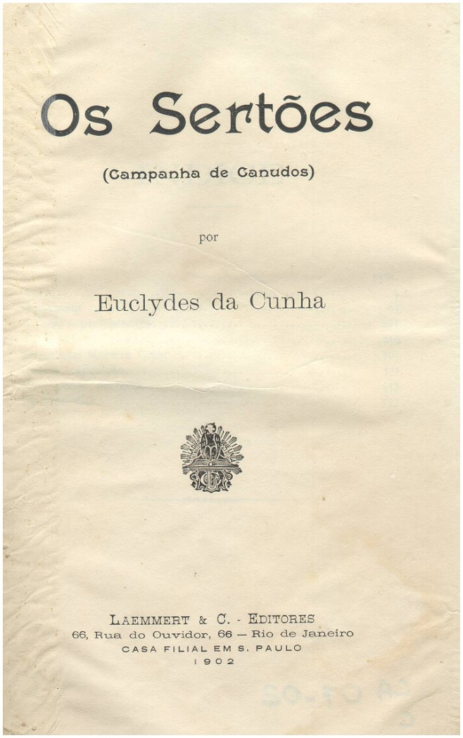 Capa do livro "Os Sertões", do escritor brasileiro Euclides da Cunha, publicada no ano de 1902 e, portanto, em domínio público em razão de sua idade.